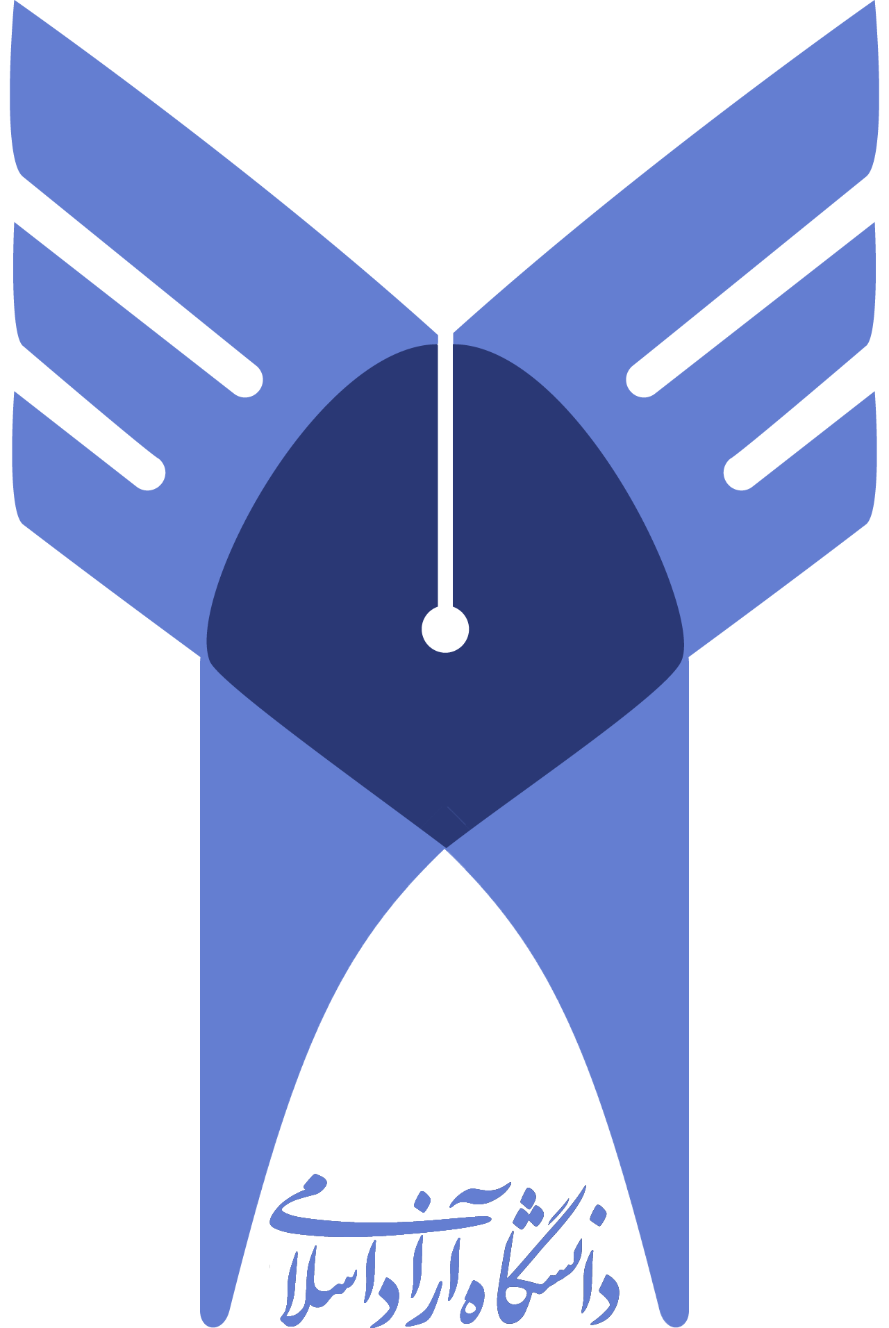 Azad University logo